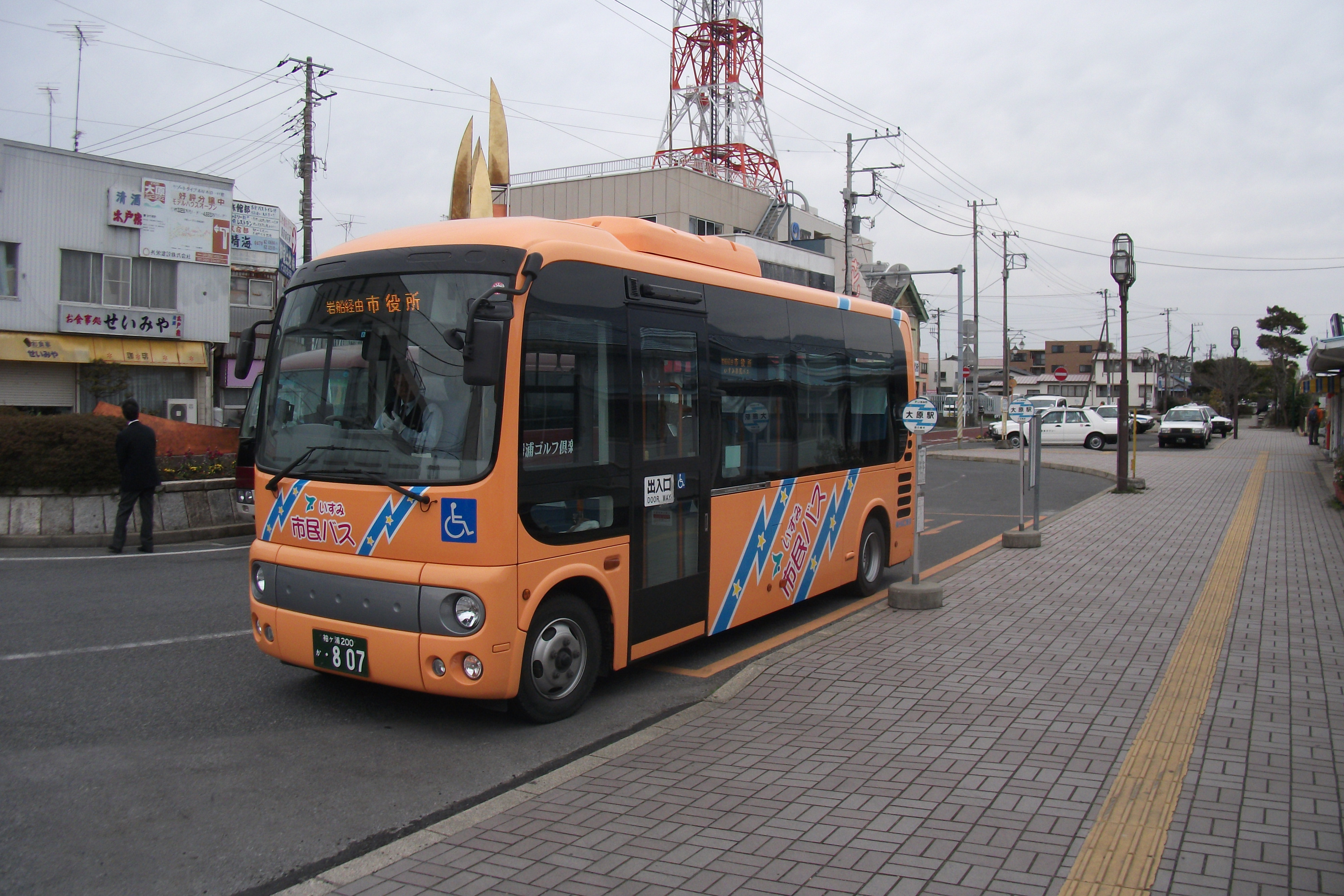 いすみ市民バス（ＨＭＣ東京委託）